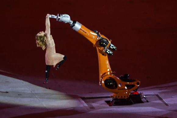 Rio de Janeiro - Cerimônia de abertura dos Jogos Paralímpicos Rio 2016 no Estádio do Maracanã